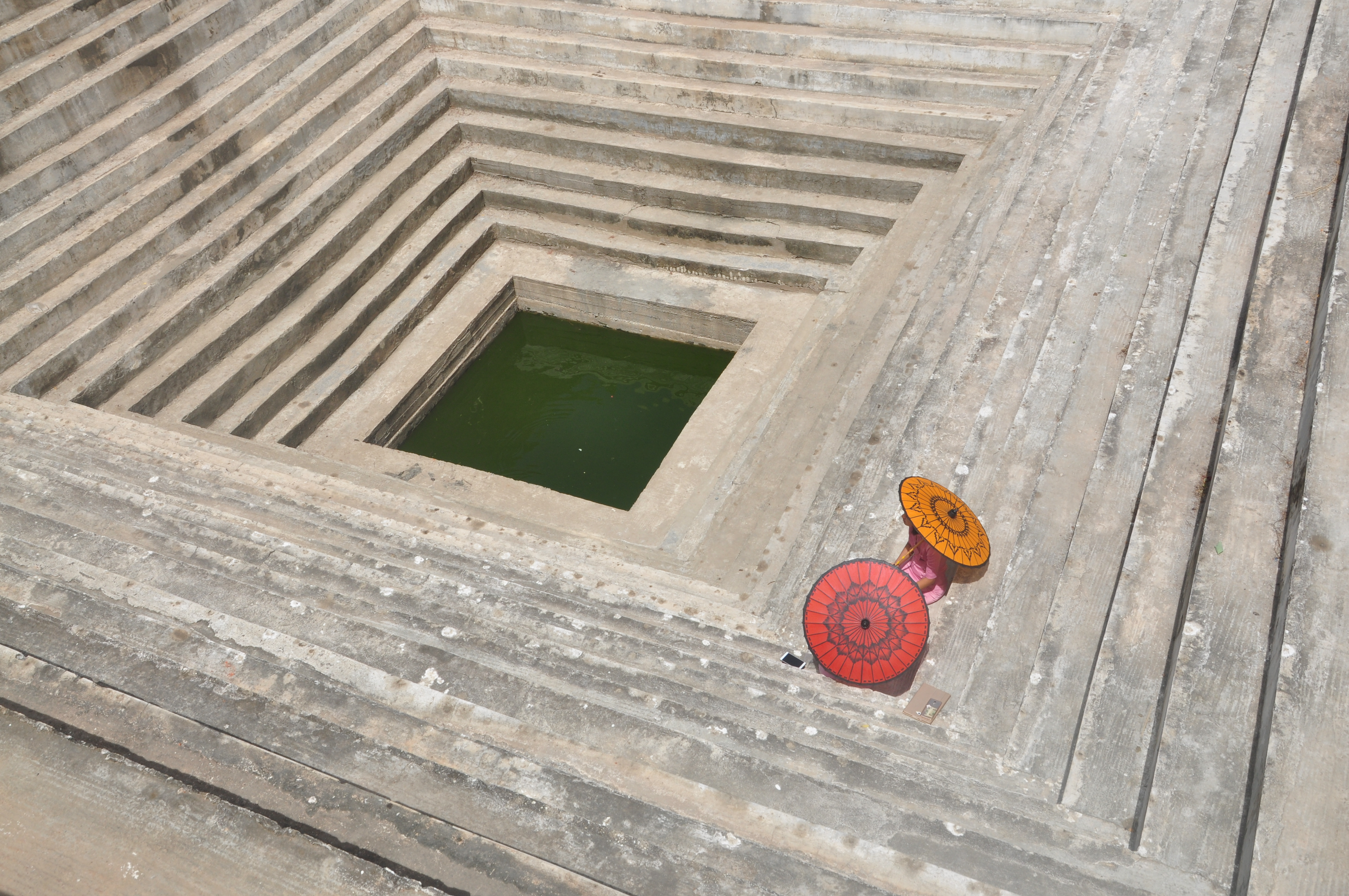 မြန်မာဘာသာ: စန္ဒမုနိဘုရား ရေကန်